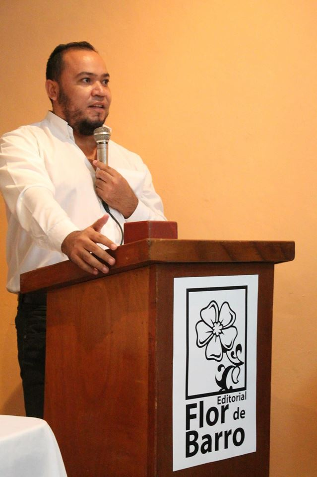 En la presentación de Todos los rumores del mundo de Alfonso Kijadurías